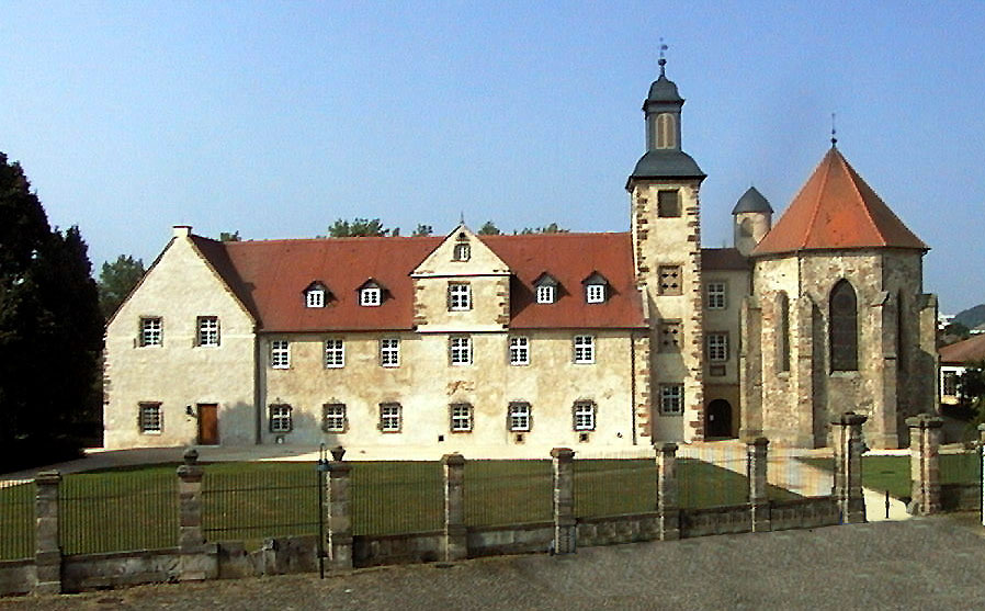 Kloster Haydau Ostansicht